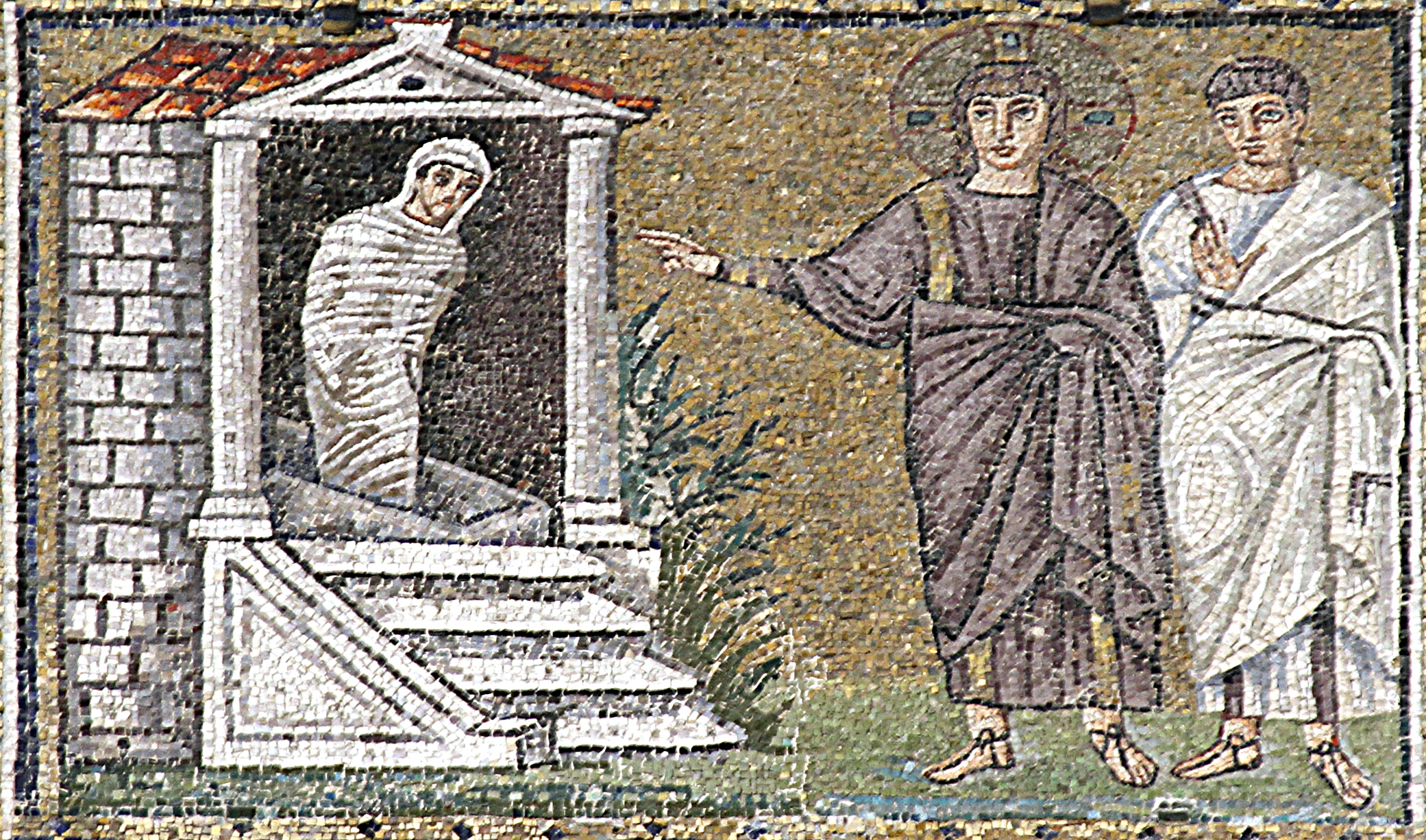 Sant'Apollinare Nuovo - Ravenna